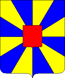 Het oude wapen van de Vlaamse graven West-Vlaanderen Vlaanderen